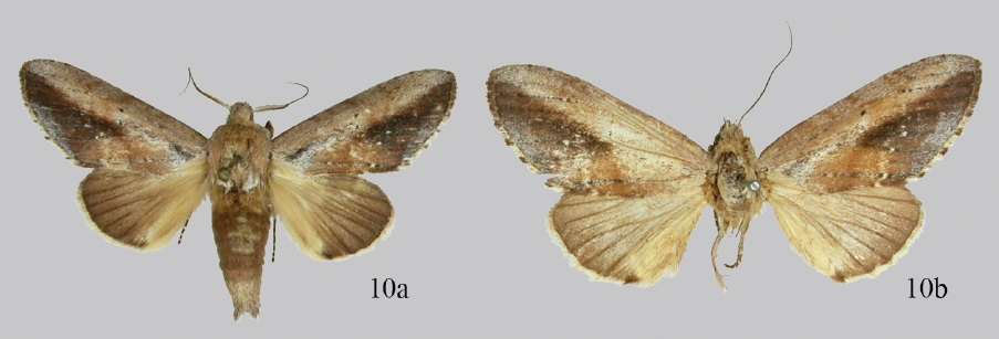 Disphragis bifurcata